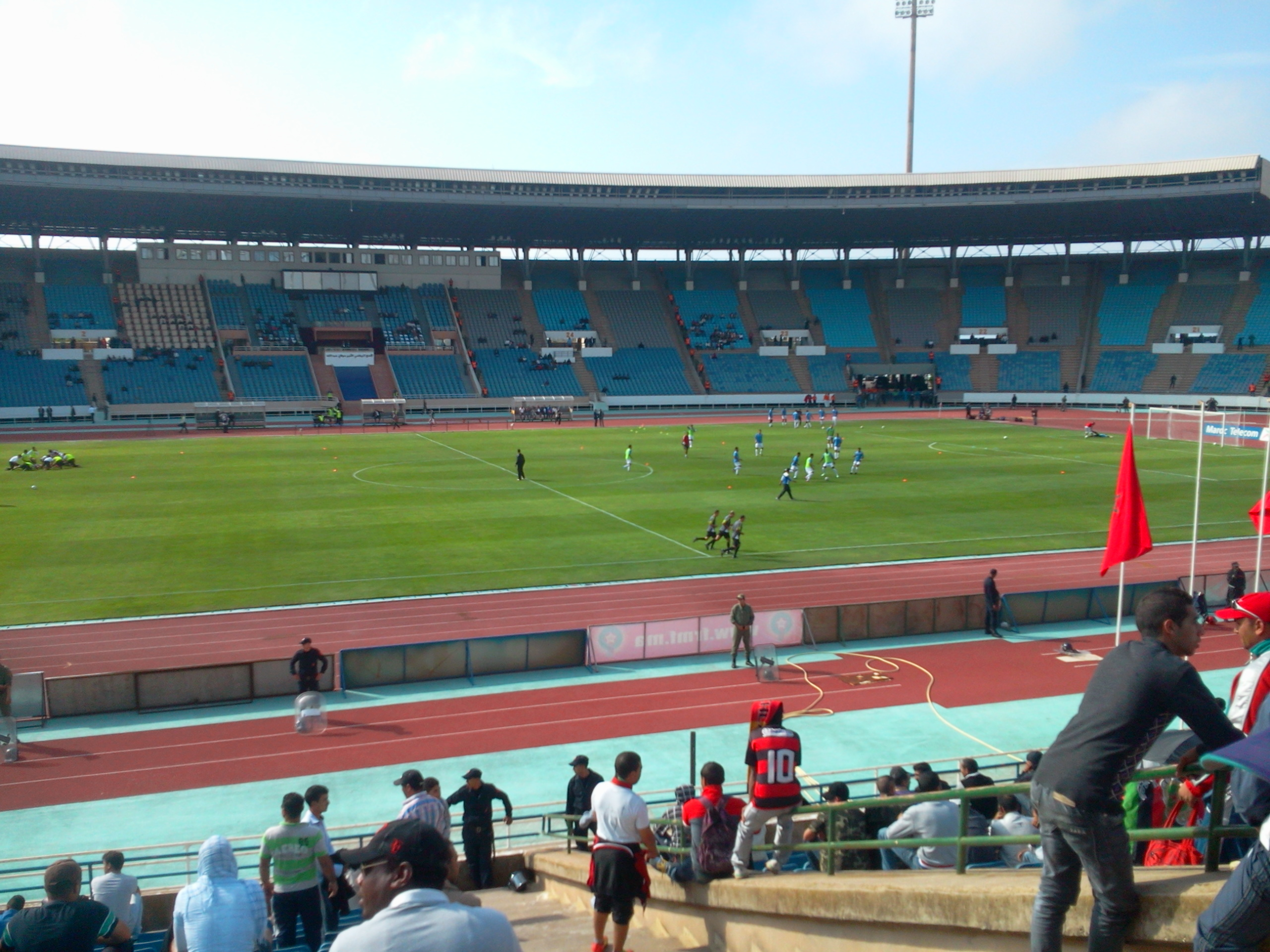 Échauffements des deux équipes avant le match.